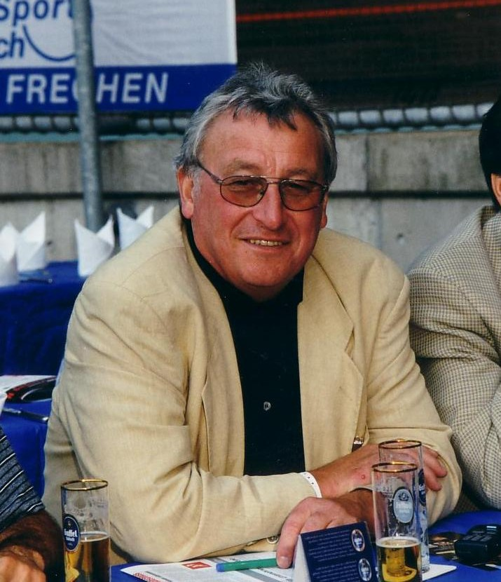 Winfried Holtmann, deutscher Journalist und Radsport-Organisator